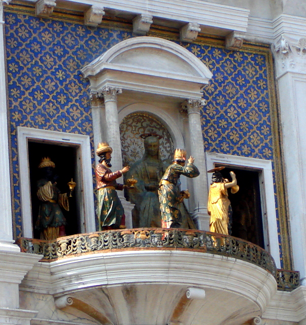 Fragment wieży zegarowej na Placu św. Marka w Wenecji